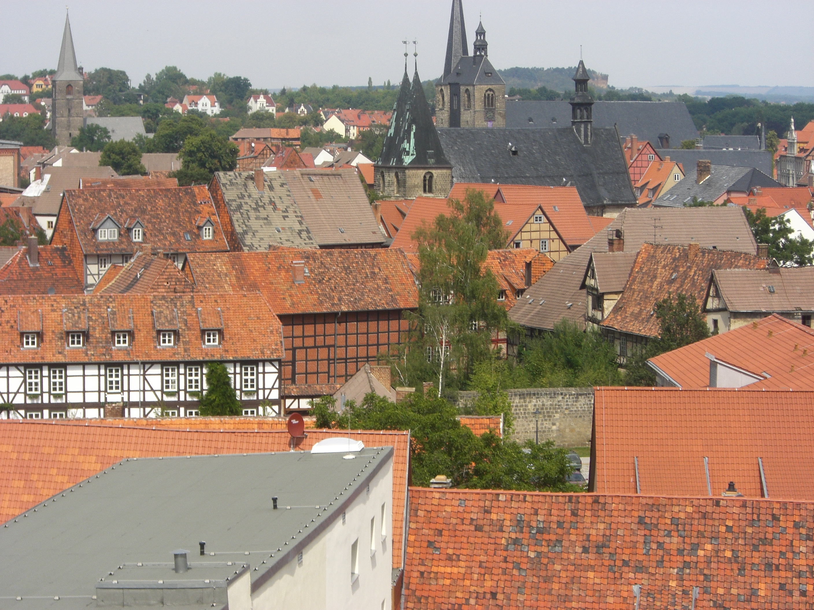 Blick auf Quedlinburg